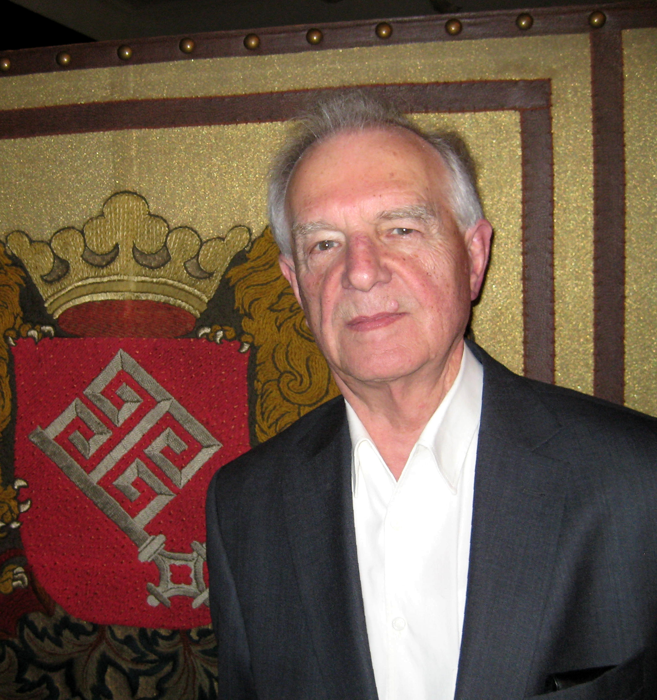 Klaus Hübotter (* 1930 in Hannover) ist ein Bremer Bauunternehmer und Mäzen.